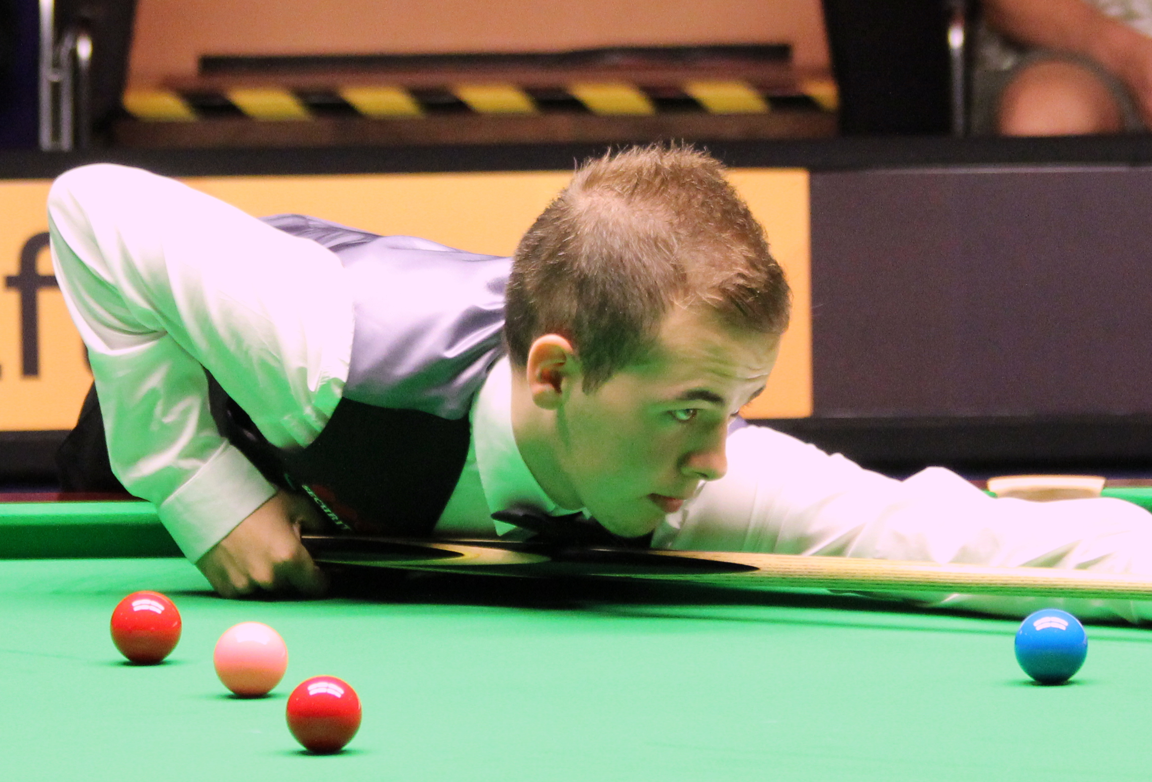 Luca Brecel beim Paul Hunter Classic 2012